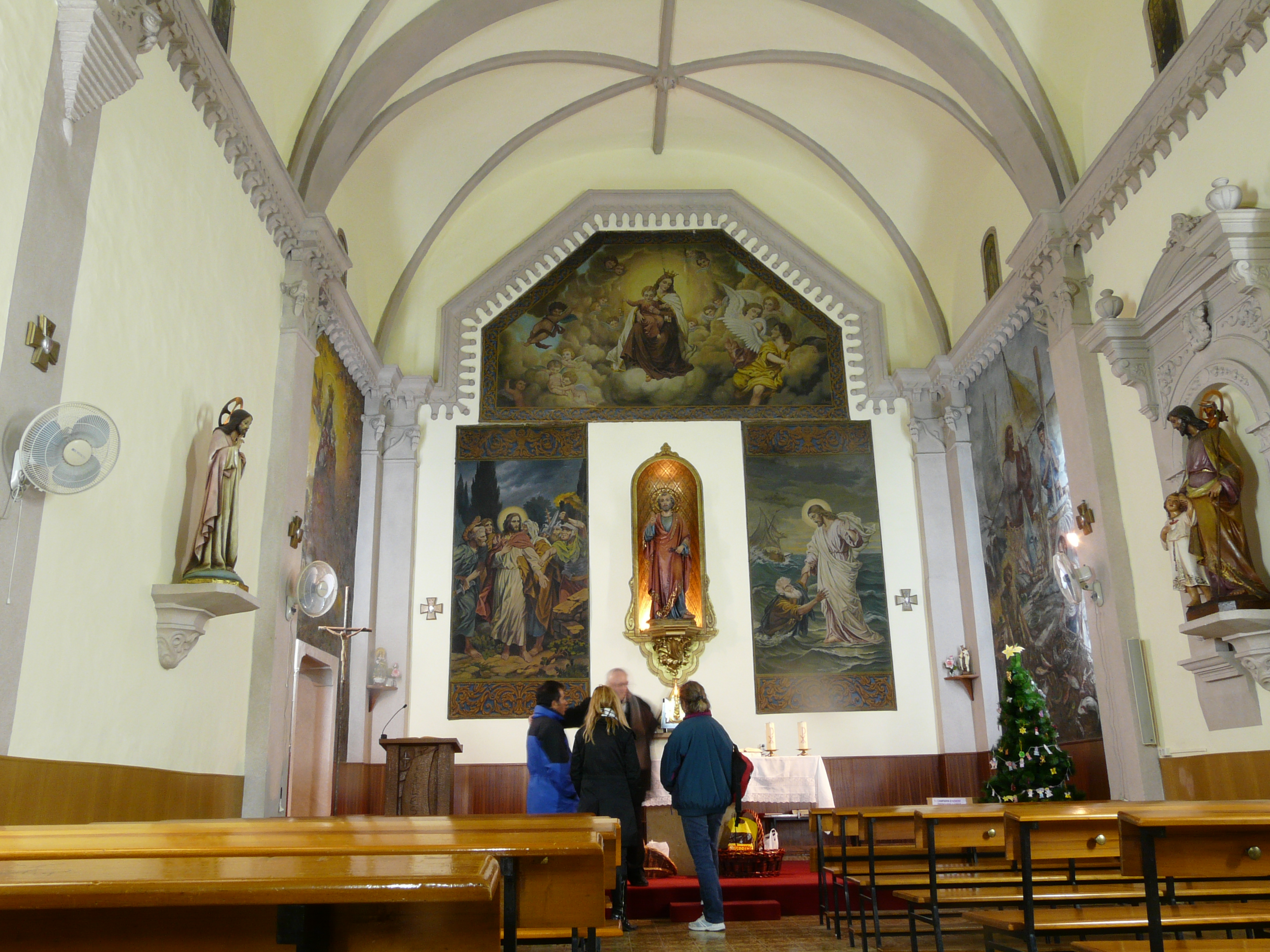 Església de Sant Pere. Pl. de Sant Pere, les Cases d'Alcanar (Alcanar). Object location40° 33′ 09.41″ N, 0° 31′ 50.23″ E